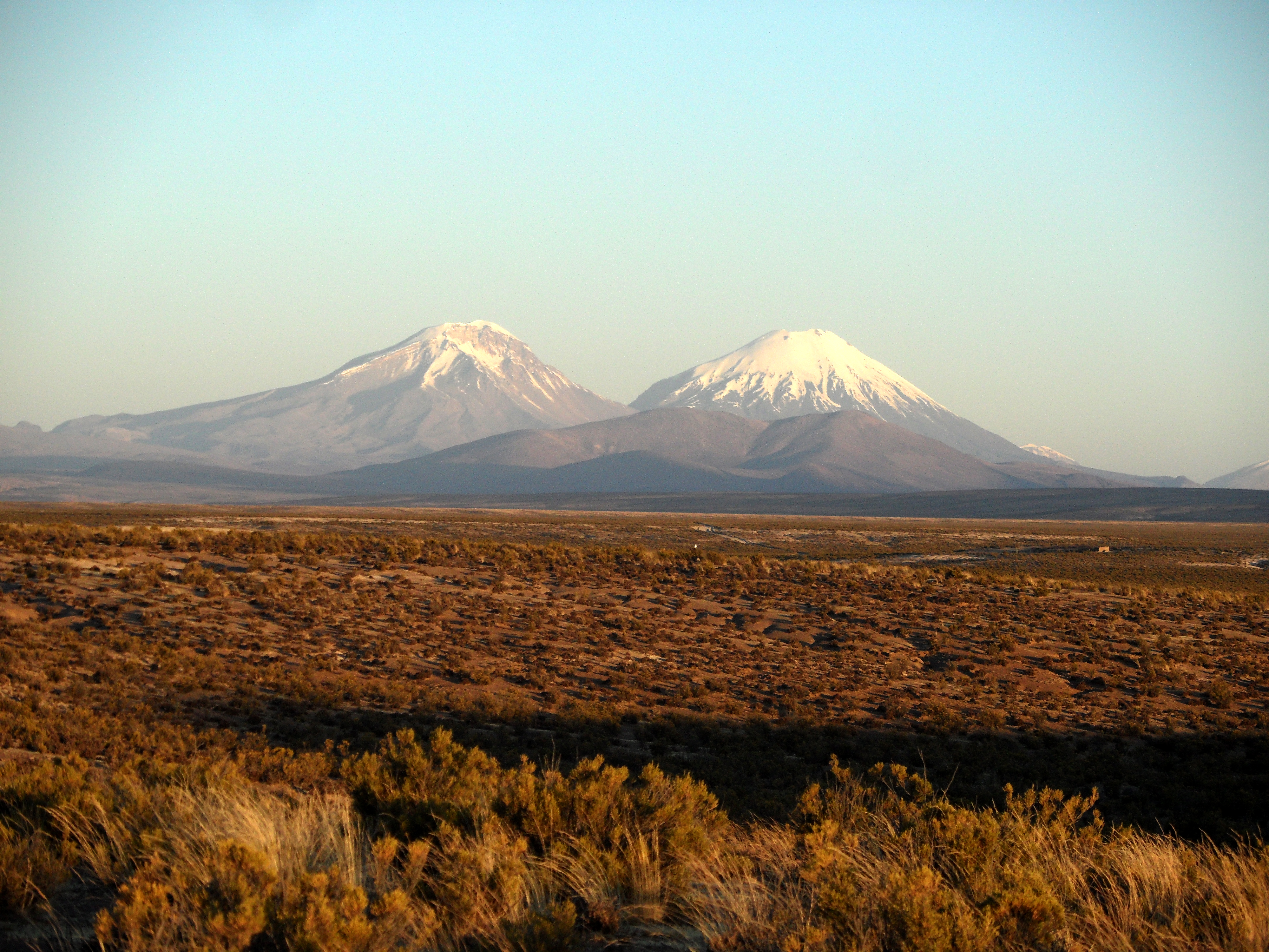 óleo sobre lienzo encolado a tabla. 150 x 100 cm. Obra de Guillermo Muñoz Vera